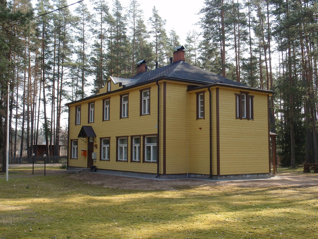 Taevaskoja raamatukogu